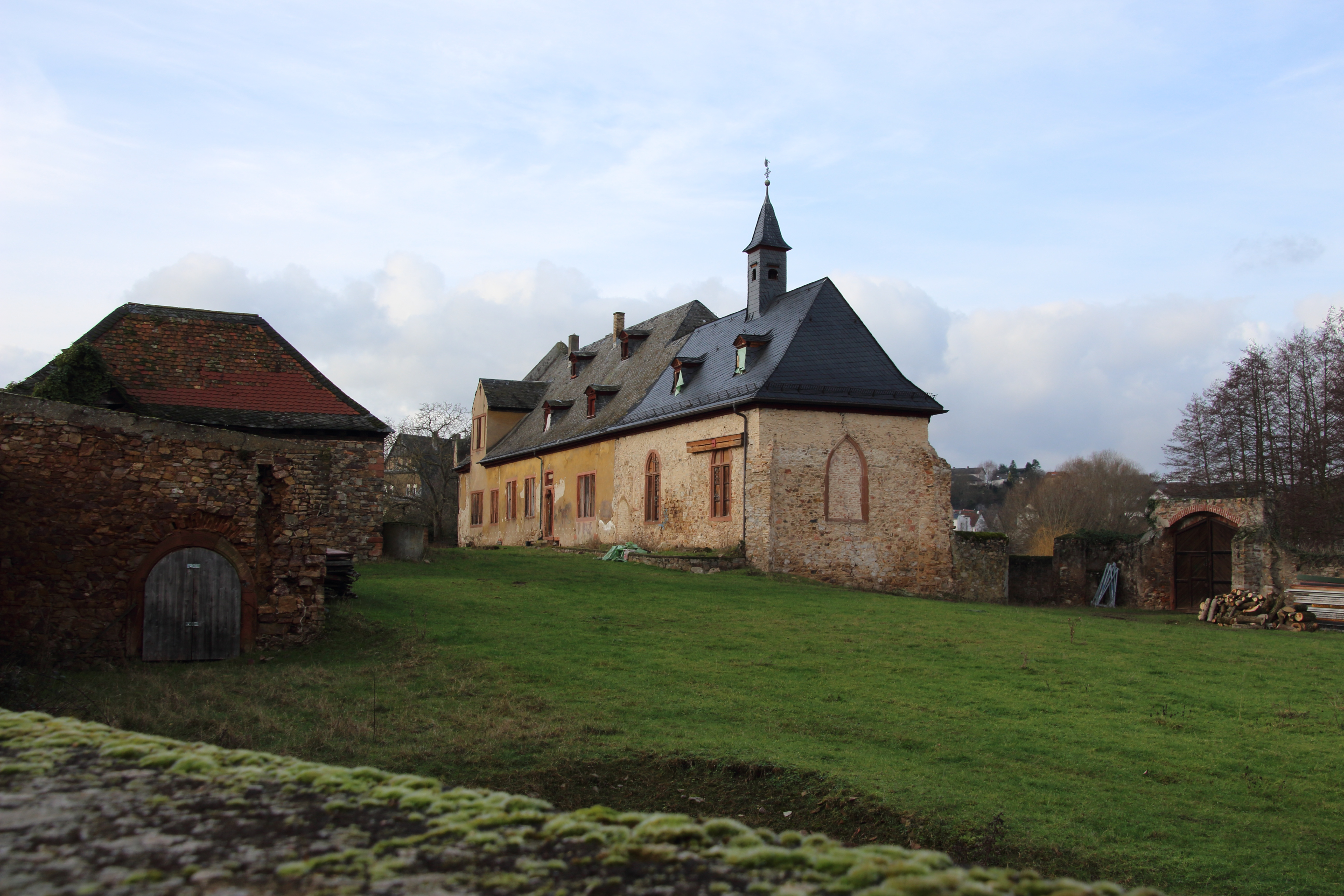 Johannisberger Klause St Georg, ehemaliges Benediktinerinnenkloster aus dem 12. Jahrhundert. Oestrich-Winkel, Rheingau